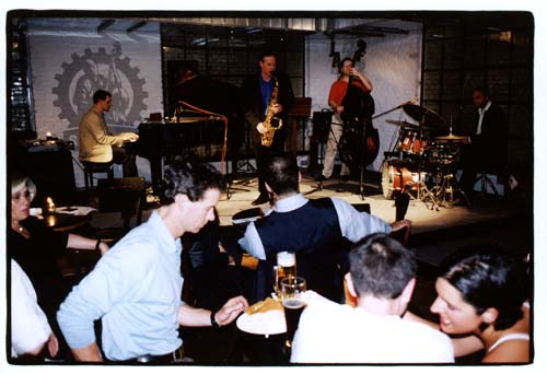 Jam Session in der Kunstfabrik Schlot, Berlin